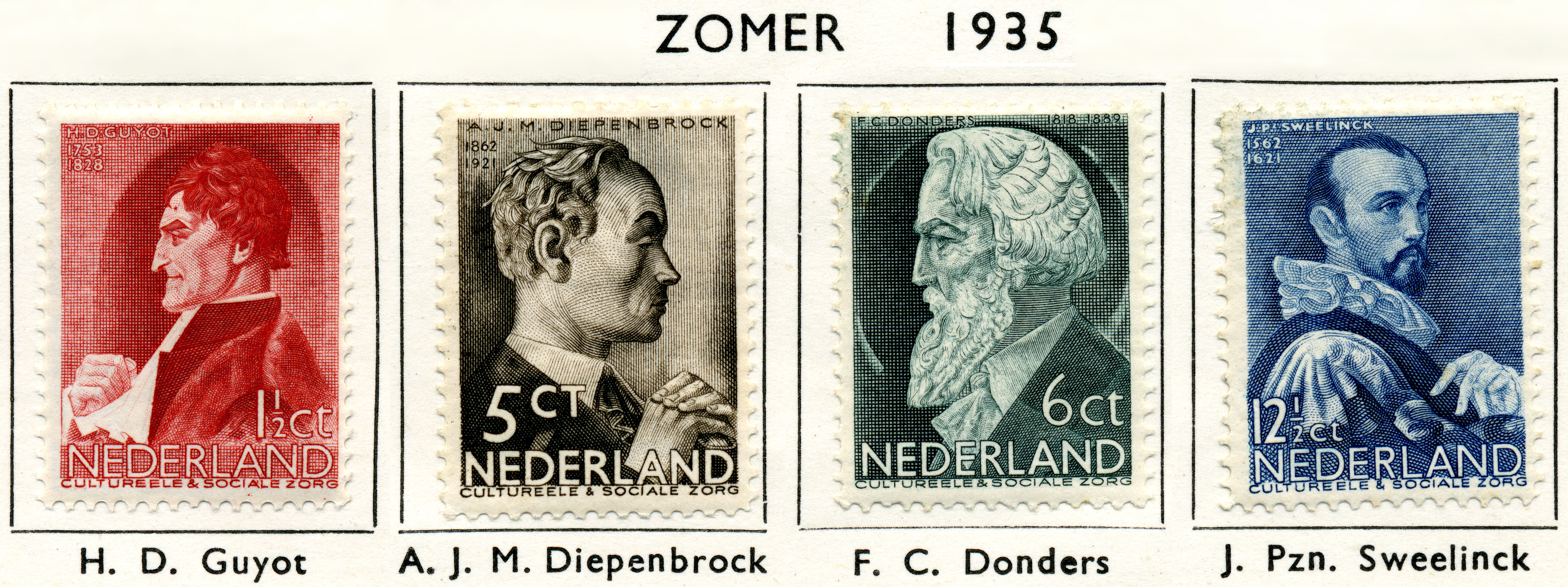 Zomerzegels (1935) met afbeelding van H.D. Guyot (1753-1828) dovenonderwijs, A. Diepenbrock (1862-1921) toonkunstenaar, Prof. F.C. Donders (1818-1889) oogheelkundige, J.Pzn. Sweelinck 1562-1621 toonkunstenaar. NVPH nr 274-277. Ontworpen door Willem van Konijnenburg.